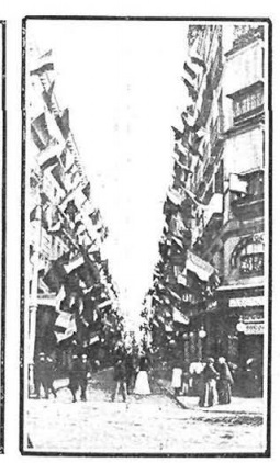 Madrid engalanado, las iluminaciones. La calle del Arenal. La calle del Caballero de Gracia. La calle de la Montera. Fots. Campúa